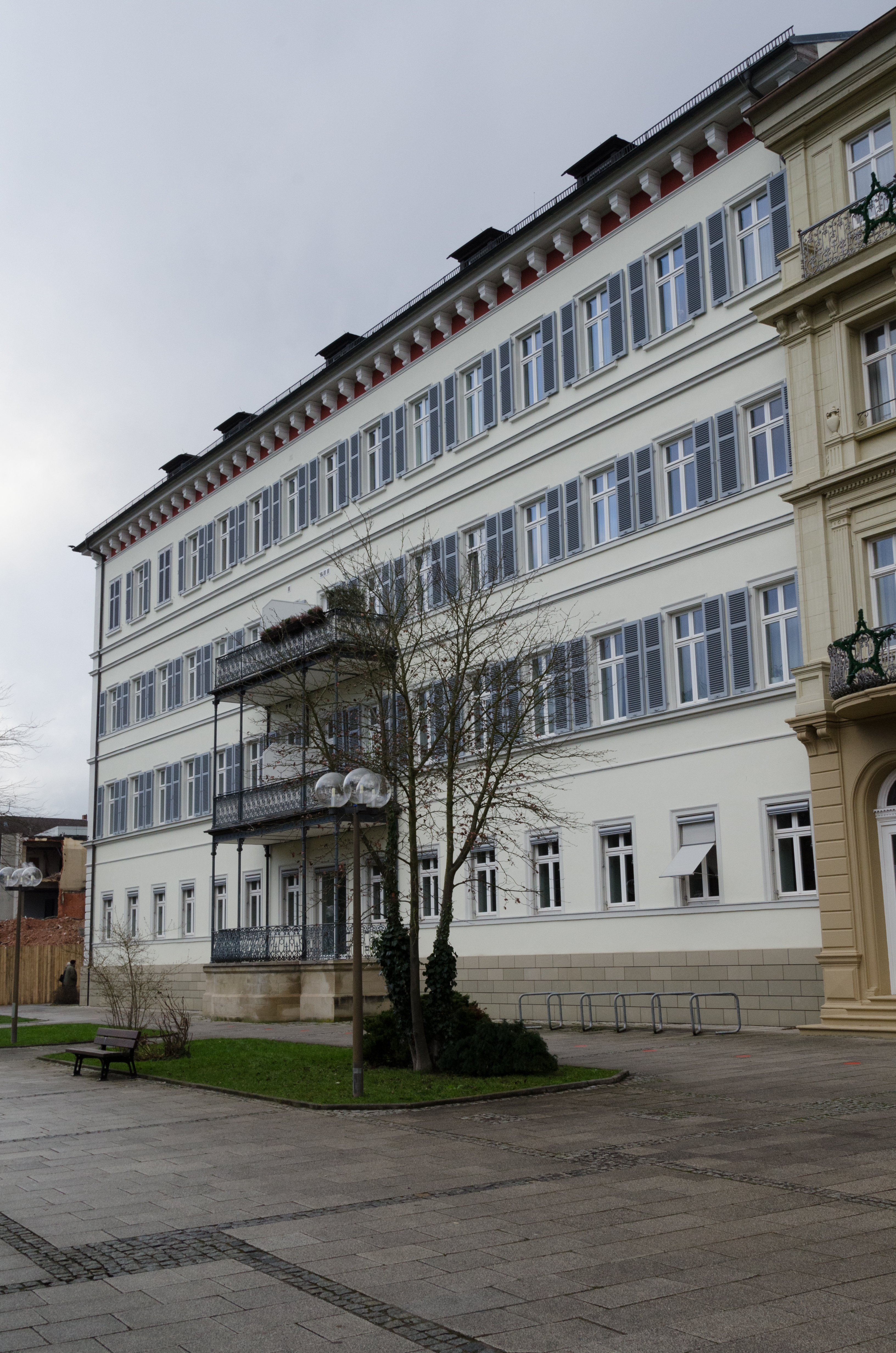 Bad Kissingen, Am Kurgarten 9, 2015-01